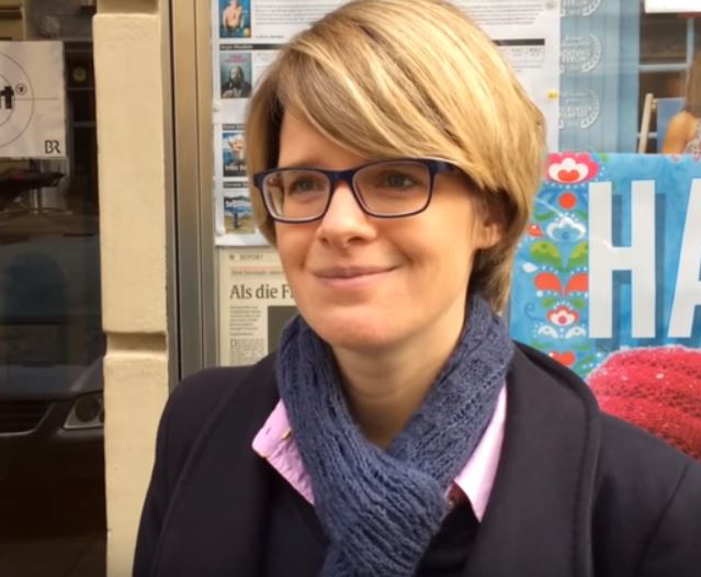 Beschreibung: Johanna Teichmann 2015 Quelle: Interne Videos Urheber: Tellux Film GmbH Endstanden: 2015 Andere Versionen